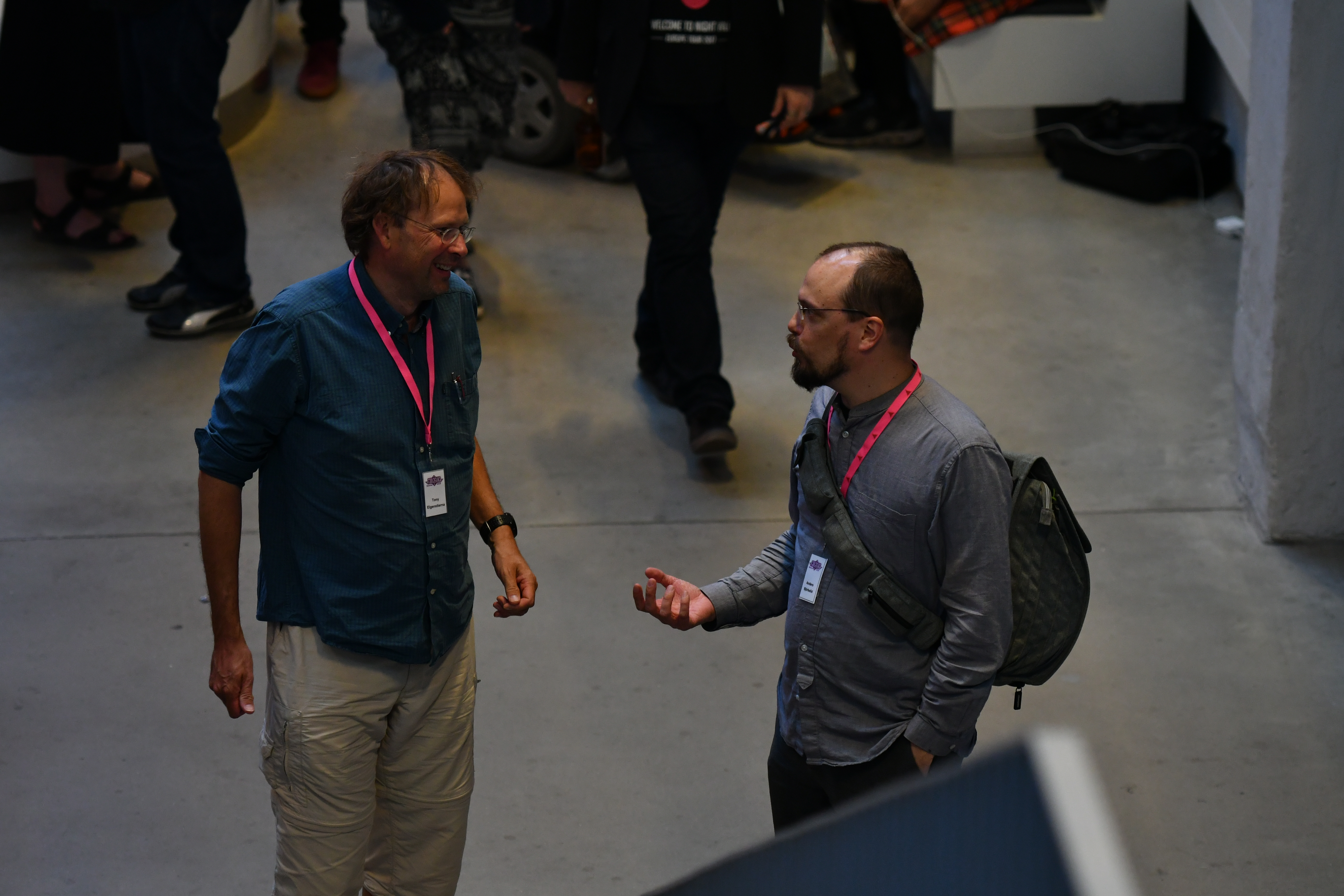 Författarna Tony Elgenstierna och Anders Björkelid på Fantastika 2018, Swecon 2018.